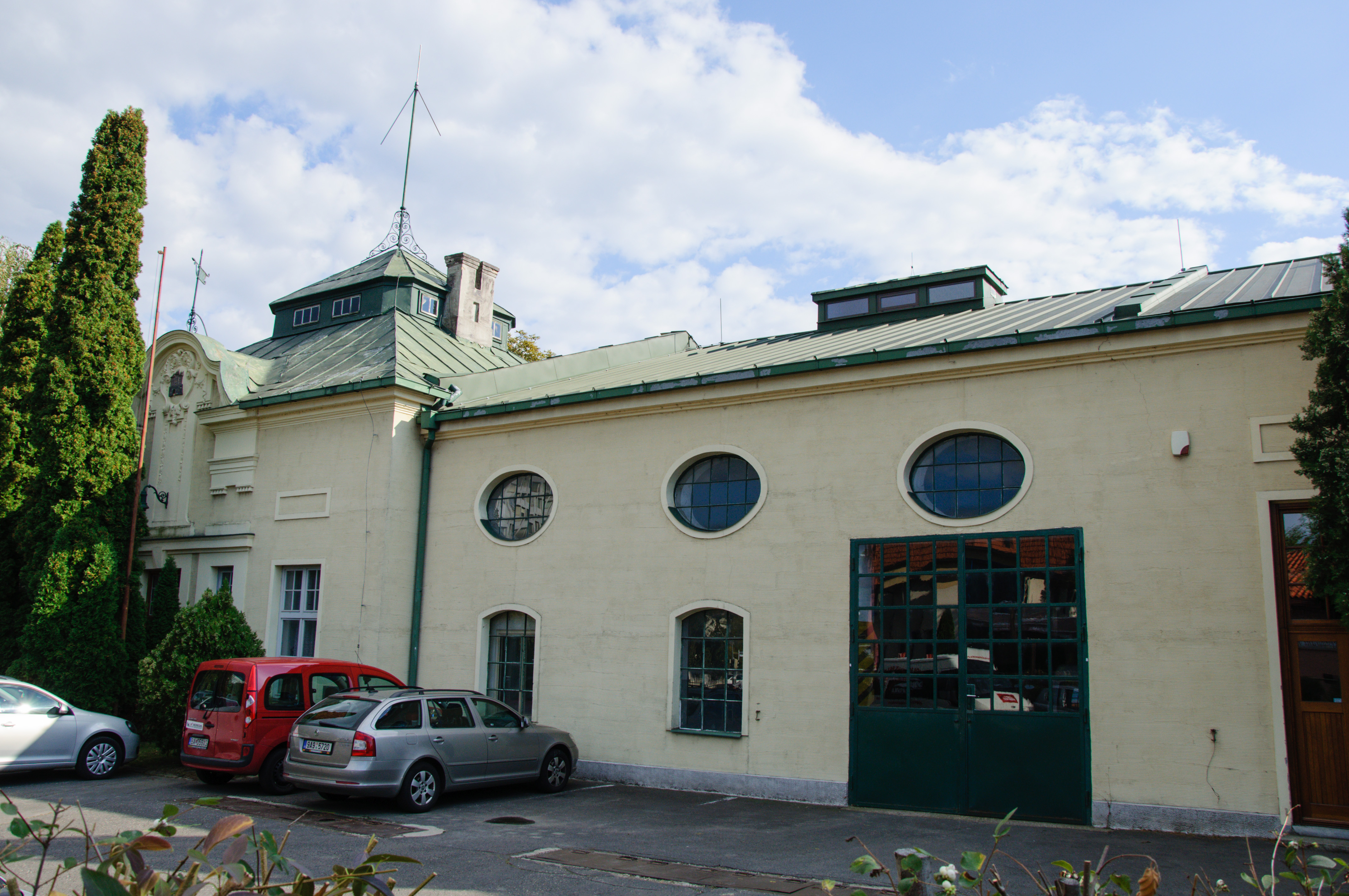 Vodárenské múzeum, Bratislava - Karlova Ves